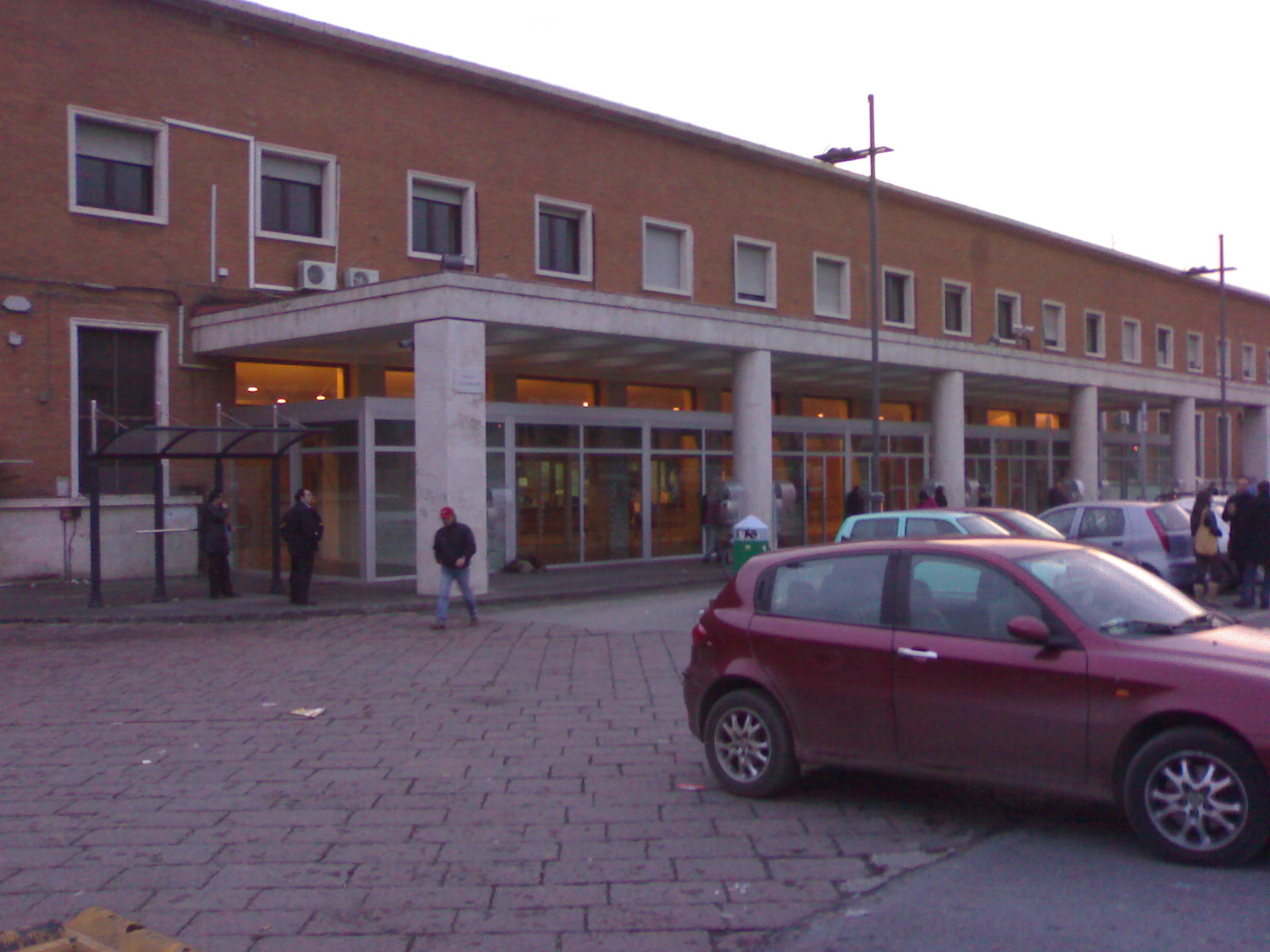 La stazione di Caserta